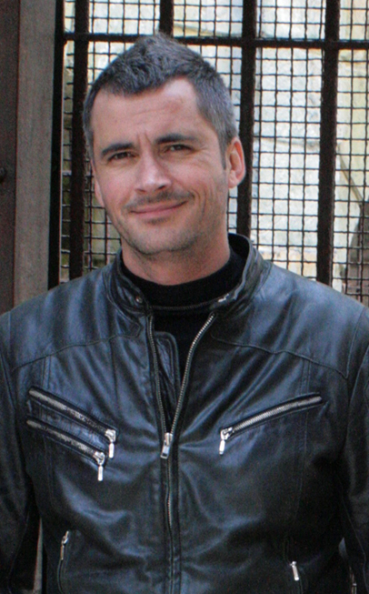 L'animateur Olivier Minne, près de la salle du trésor de l'émission Fort Boyard, en mai 2007.